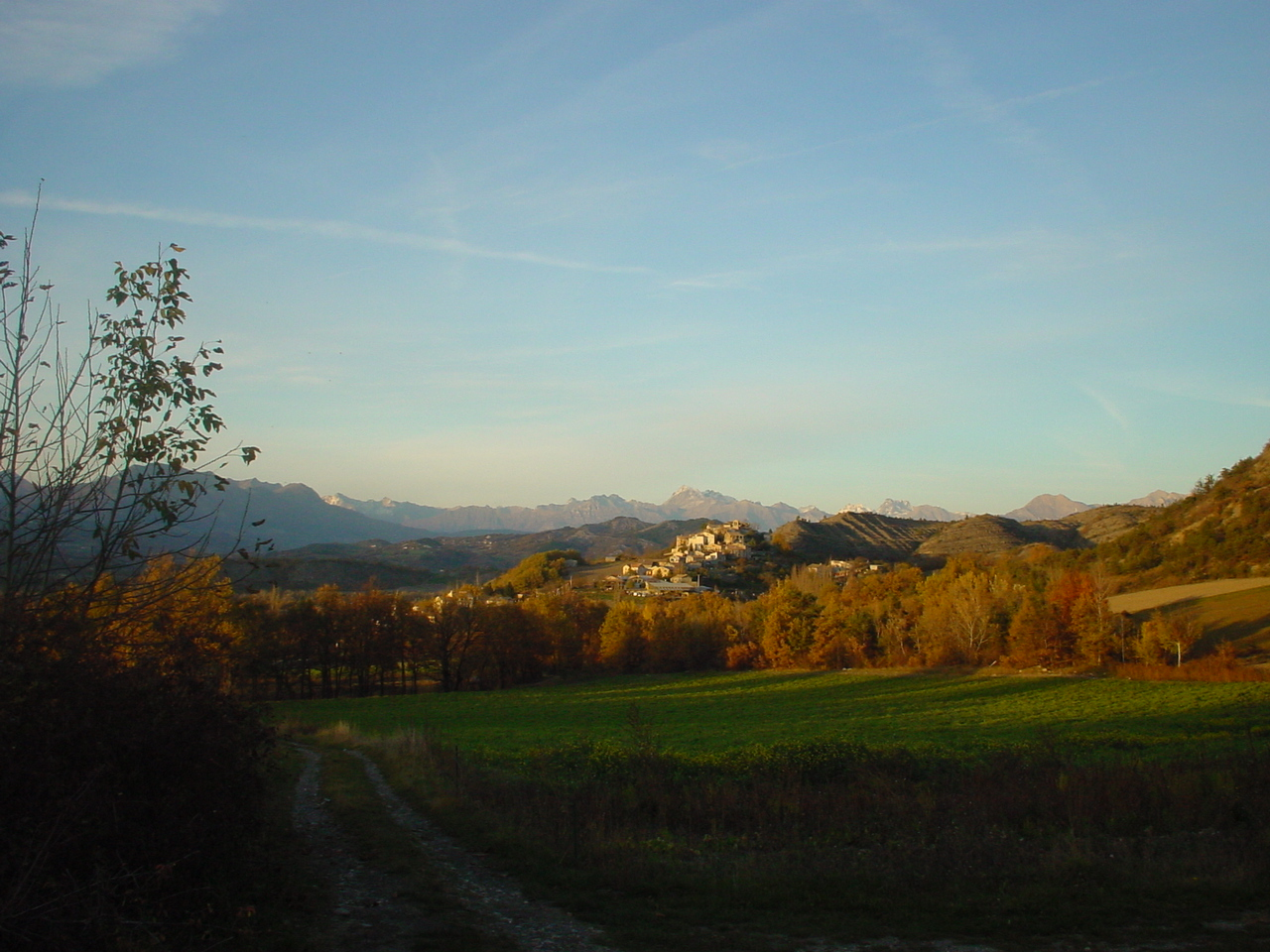 Curbans, France